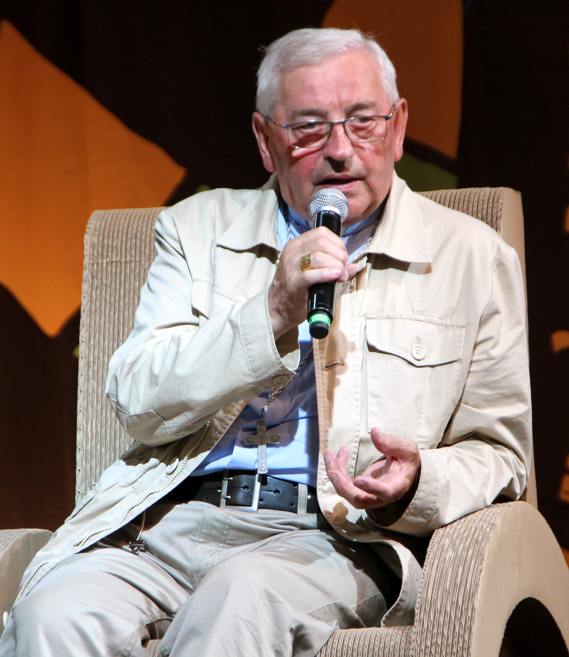 Przystanek Woodstock w 2012 r.